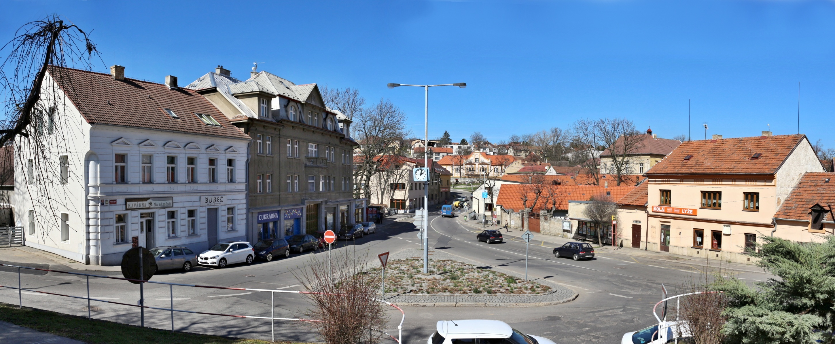 Řeporyjské náměstí